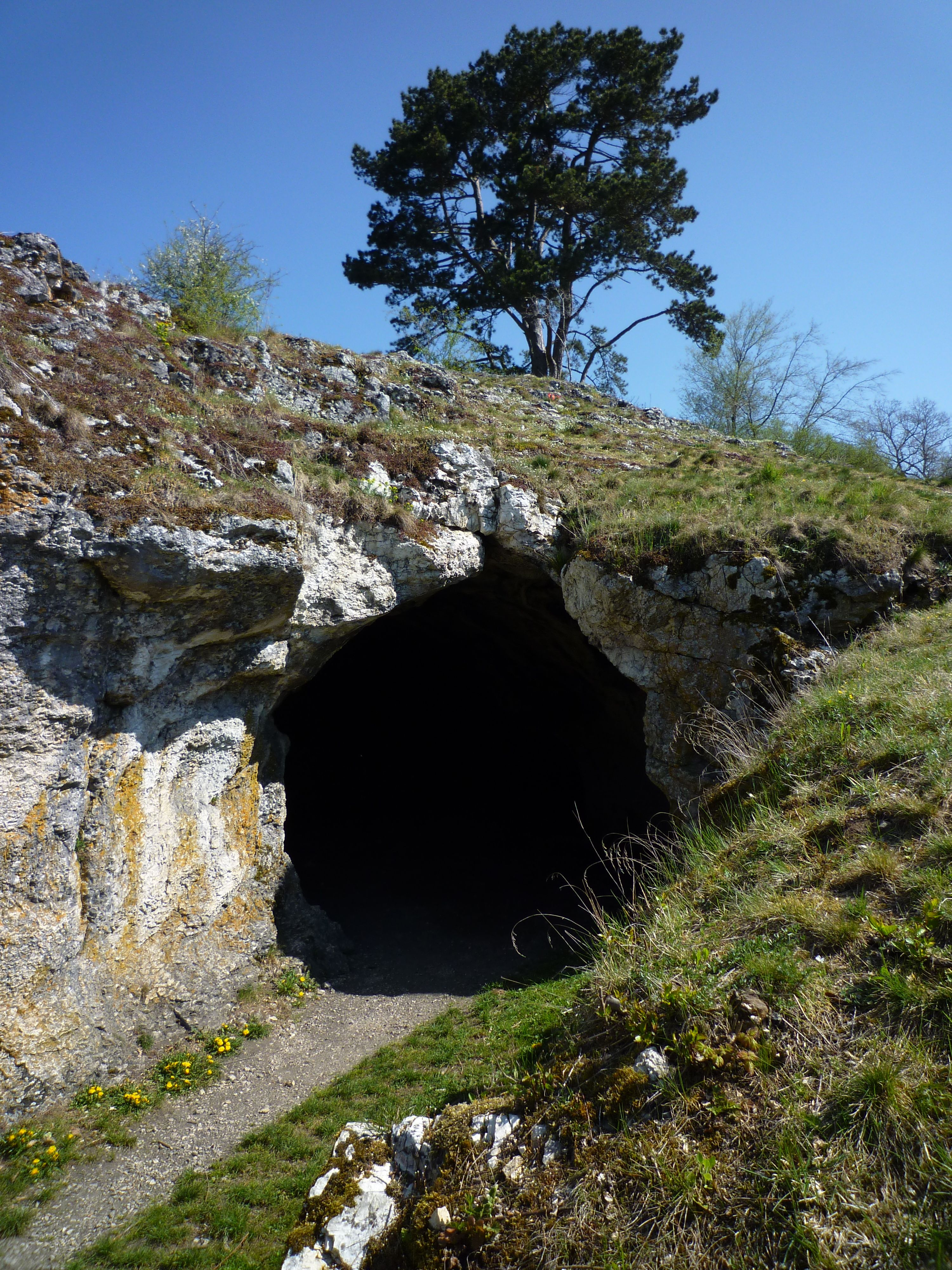 Vogelherdhöhle im Lonetal, Fundort des Pferdchens aus Mammutknochen,32 TSD Jahre_02.jpg